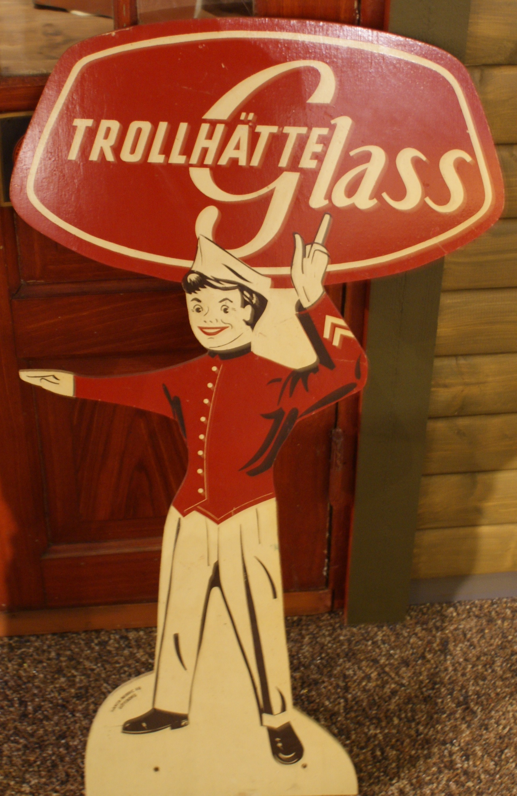 Gammal reklamskylt för Trollhätteglass